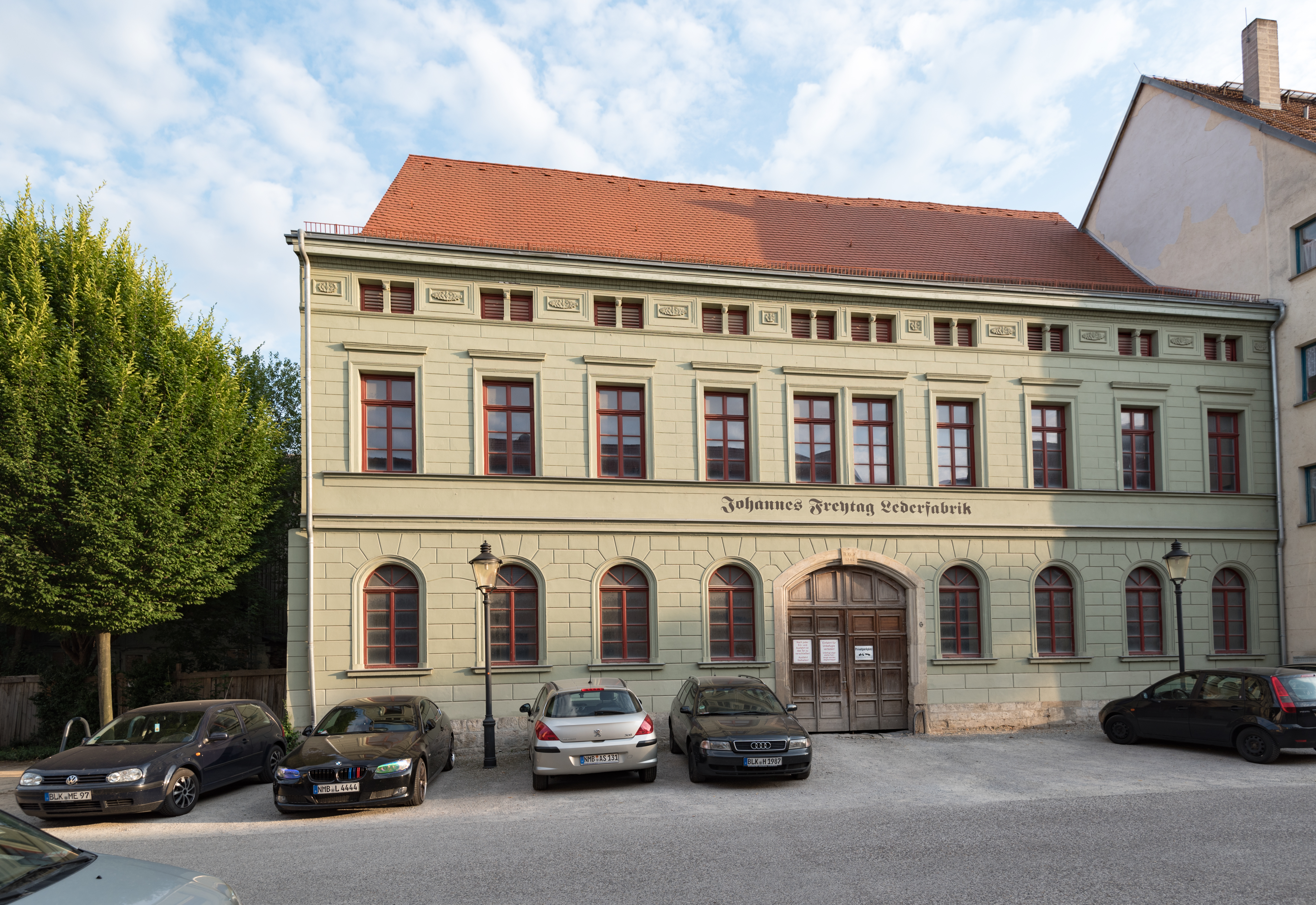 Naumburg (Saale), Reußenplatz 6